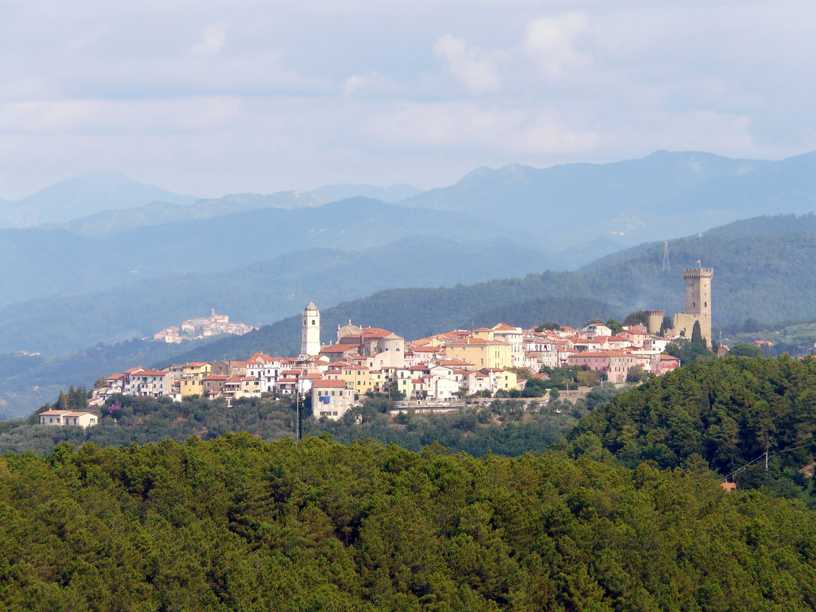 Panorama di Castelnuovo Magra dal borgo di Nicola, Liguria, Italia